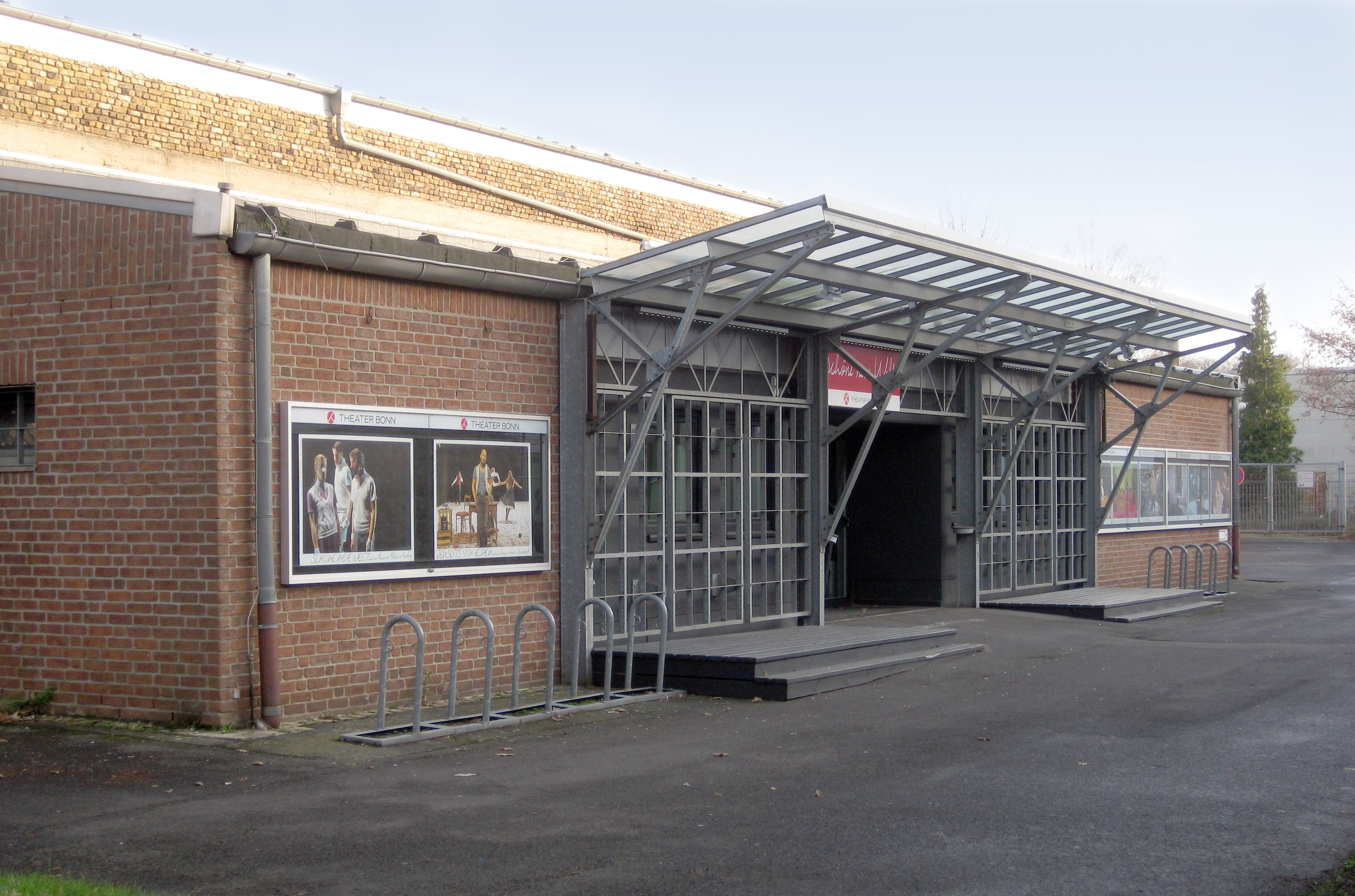 Deutschland, Bonn-Beuel, Siegburger Straße 42 (Bushaltestelle Pantheon Beuel): Einfahrt zu den als Baudenkmal geschützten Fabrikanlagen einer ehemaligen Jutefabrik (gegr. 1868). Im Bild links: das 1910 erbaute Pförtnerhaus, in der Mitte: die ehemalige Maschinenhalle. Seit 1981 ist das Gelände im Besitz der Stadt Bonn. Zum Zeitpunkt der Aufnahme war das Bonner Theater (Schauspiel & Oper) Nutzer des Hallenkomplexes mit seinen Schauspielhallen; genannt „Halle Beuel“. Dort sind neben Probe- und Aufführungsbühnen auch Verwaltungsbüros, Werkstätten für Bühnenbau, Kostümschneiderei, Maskenbildnerei und Lager untergebracht. Für Publikumsaufführungen wurden drei Hallen genutzt: die eigentliche "Halle Beuel, "Lampenlager" und "Alter Malersaal". Auf dem Gelände verfügt auch die Freiwillige Feuerwehr Beuel über Garagen mit Einsatzfahrzeugen und ein Büro.